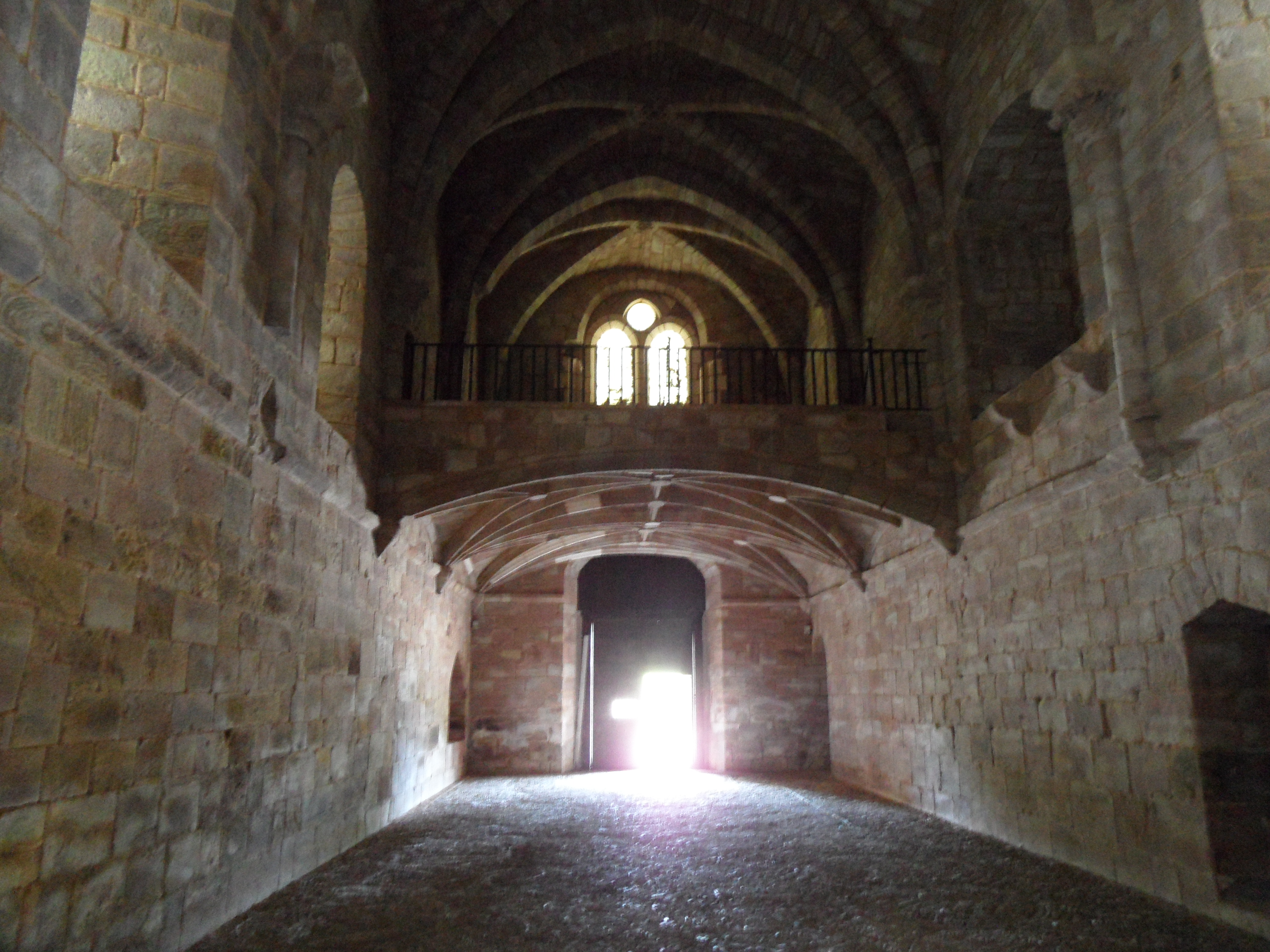 Monasterio Santa Maria de Bujedo de Juarros. Este Monasterio es de propiedad privada, y ha sido restaurado siendo galardonado por la Asociación Europa Nostra en el año 1981